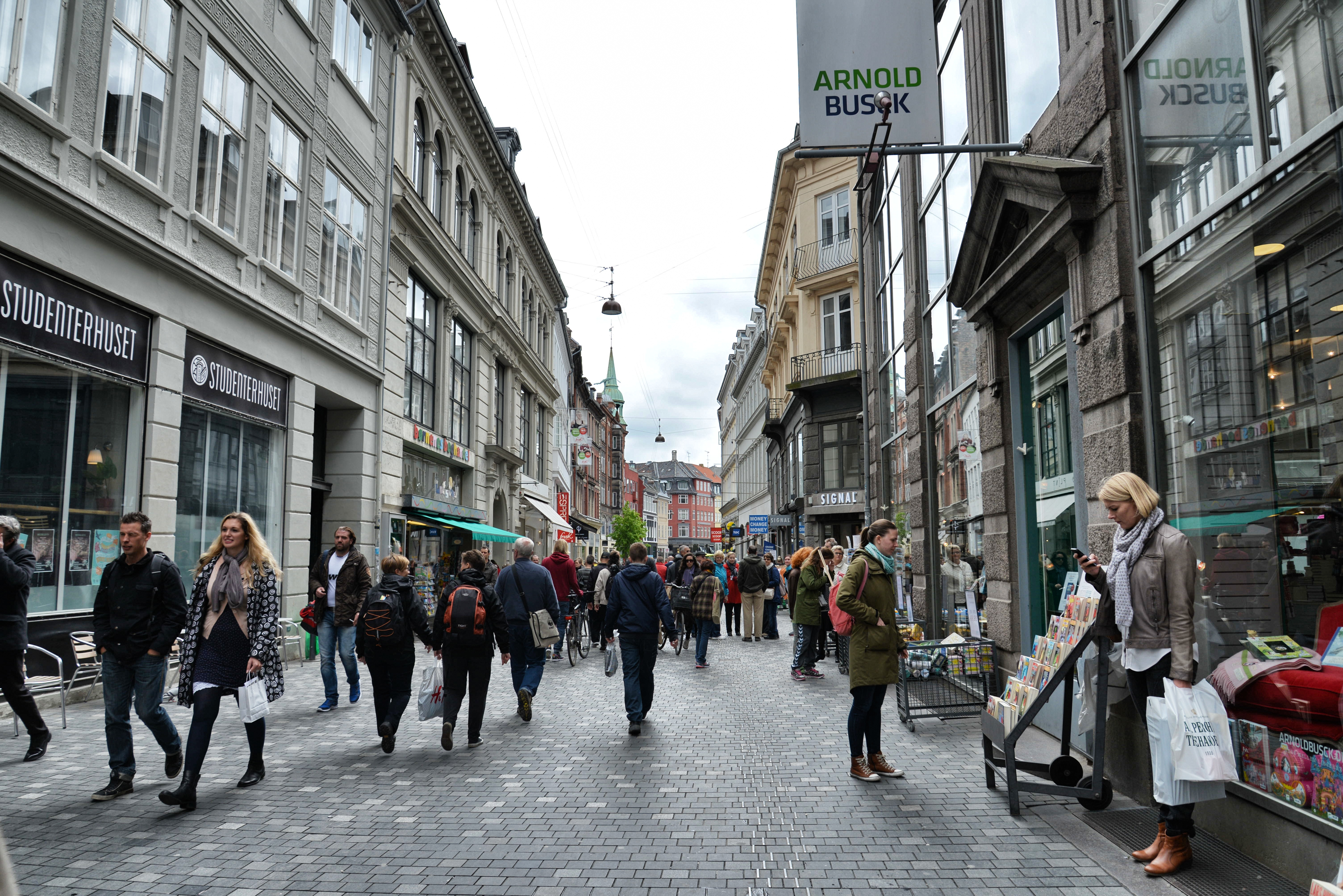 Købmagergade in Copenhagen, Denmark